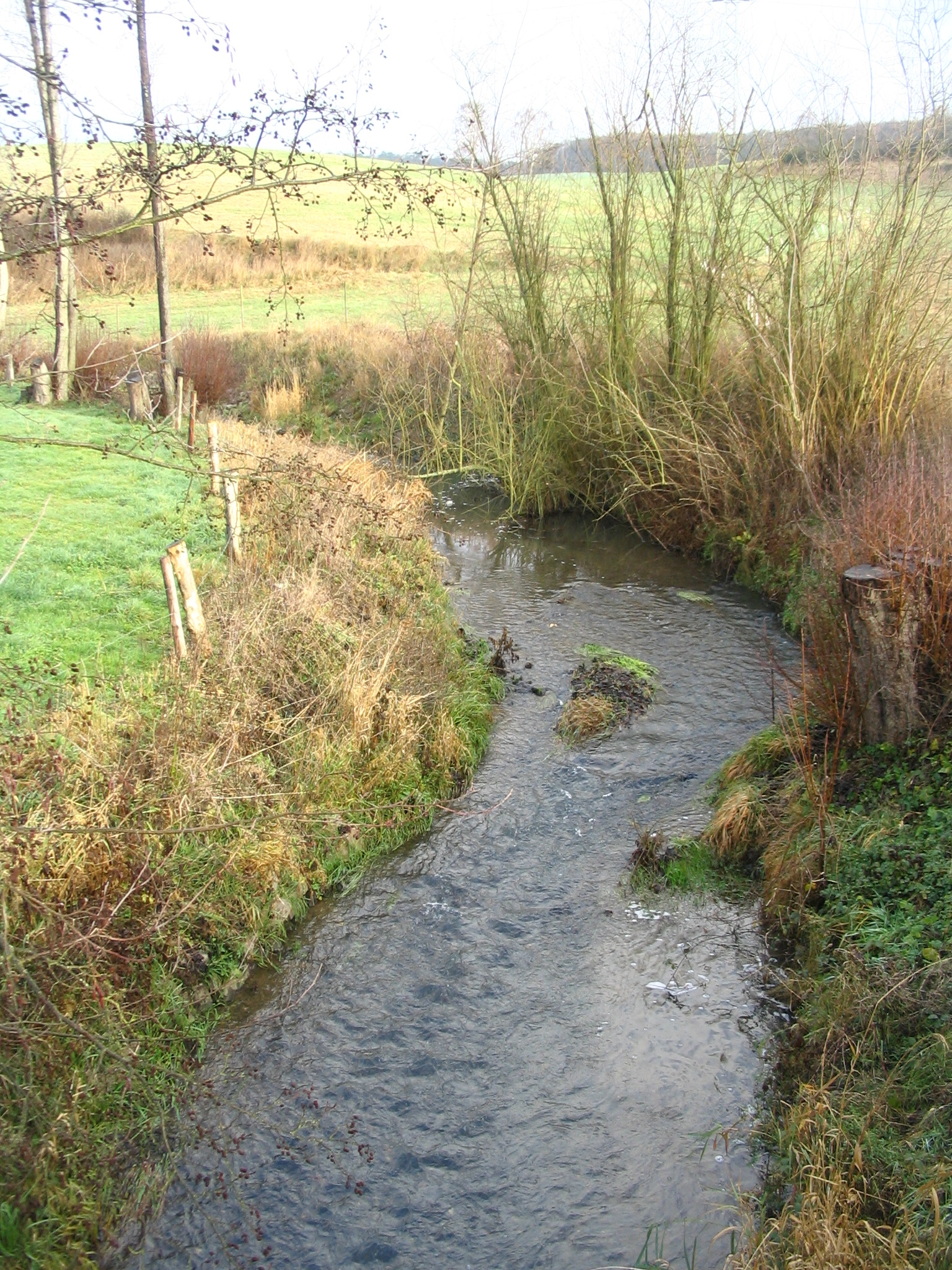 Külzbach bei Alterkülz im Hunsrück